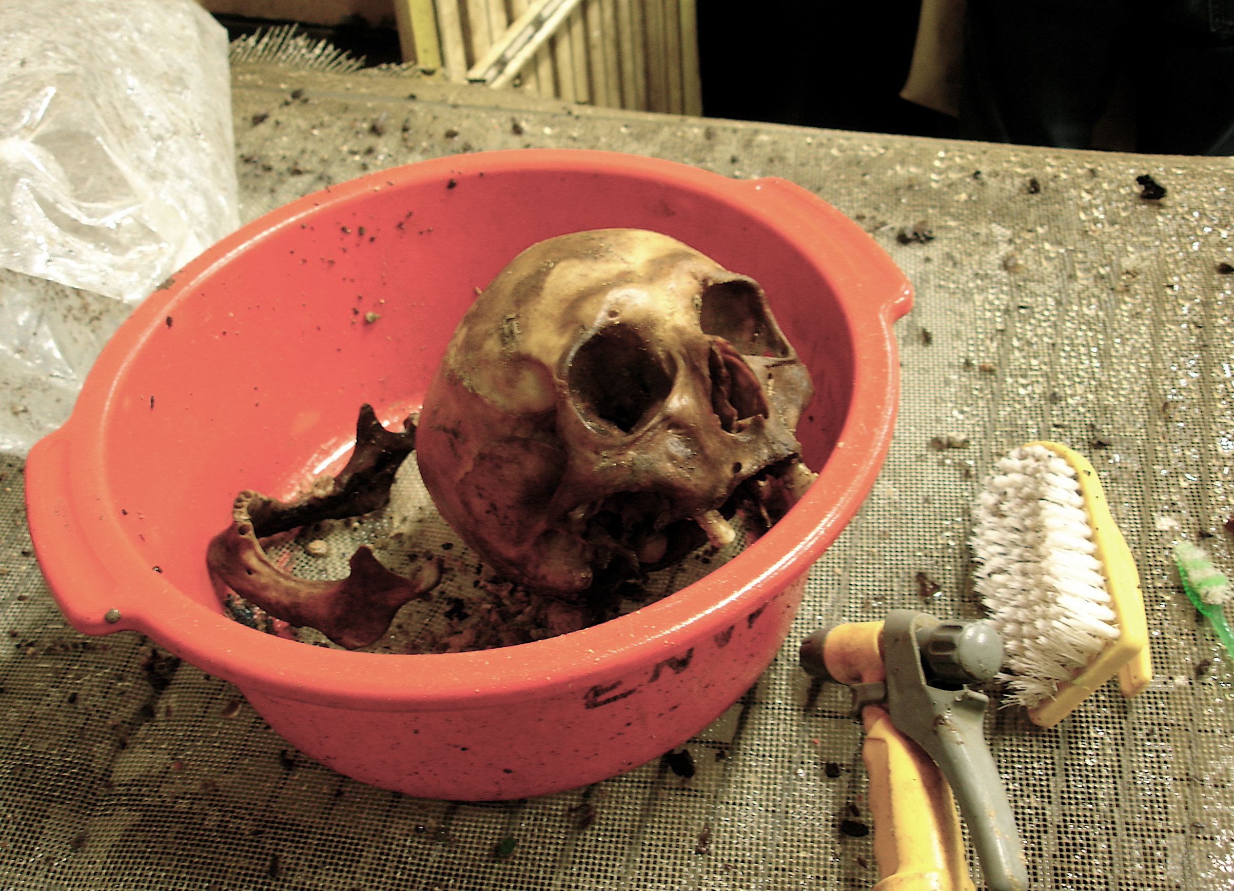 geoarchaeologist column sample